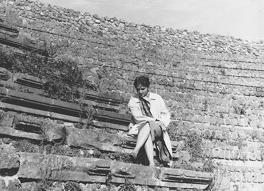 Klementyna Żurowska na schodach teatru w Pompejach 1959 r.